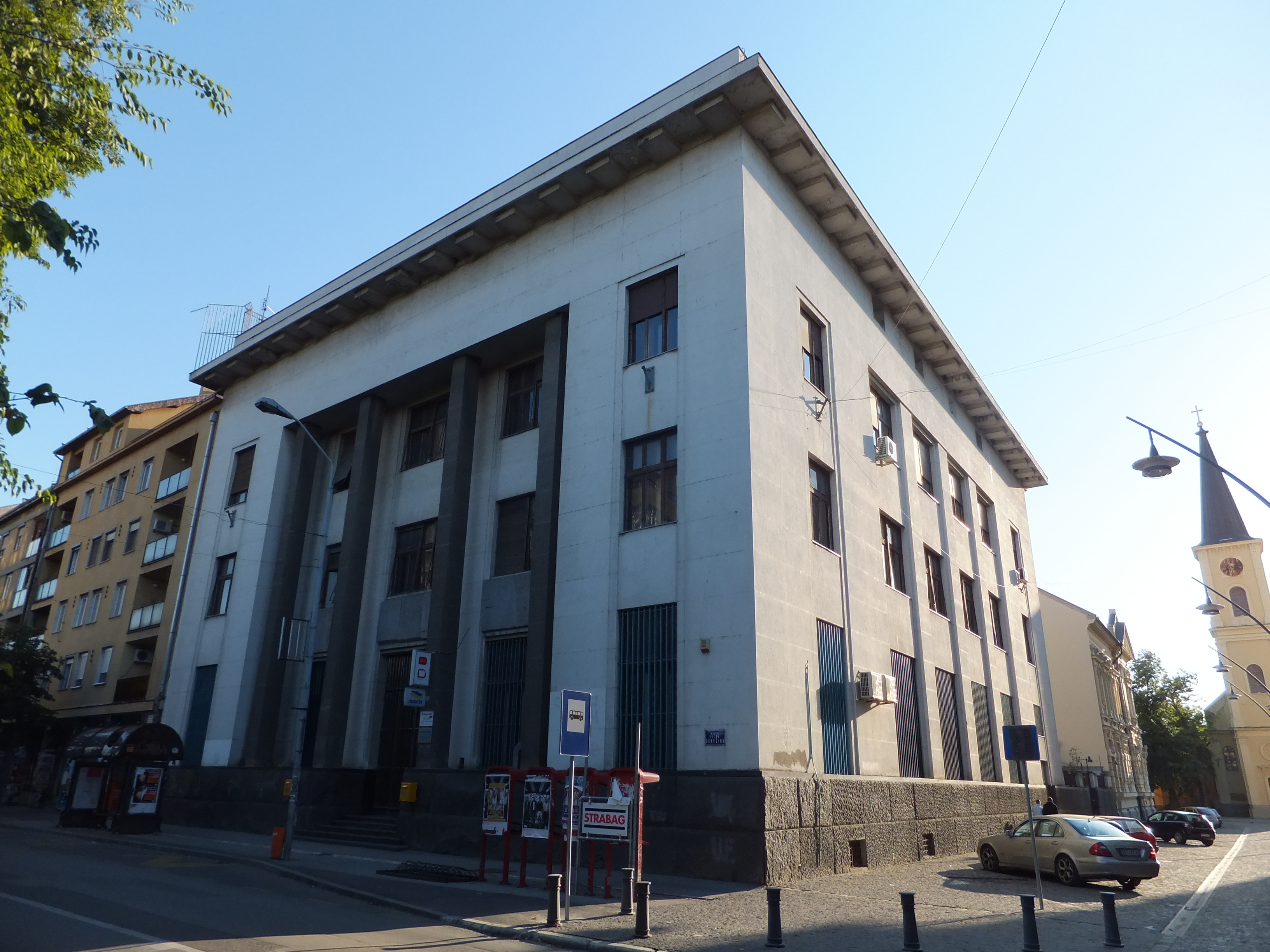 Зграда старе поште у Панчеву